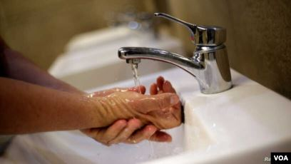 El yıkama